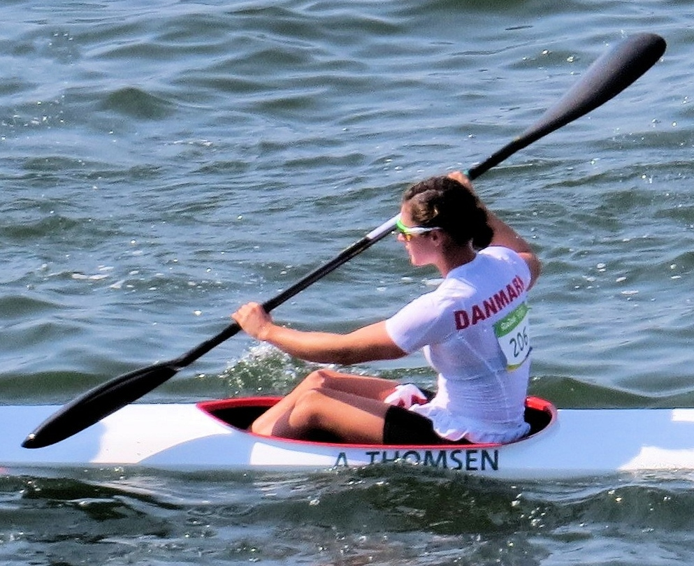 Sx50